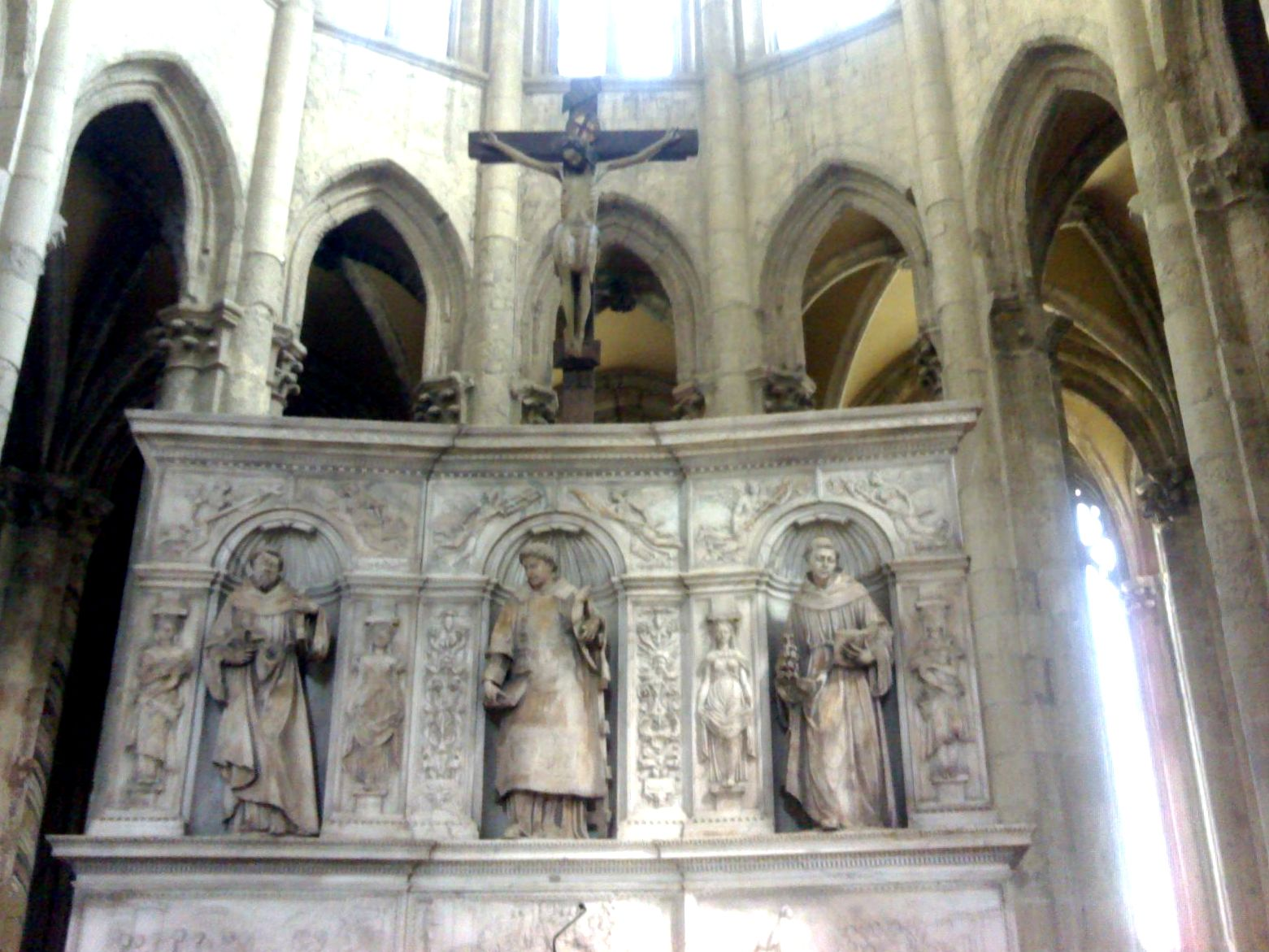 Basilica di San Lorenzo Maggiore (Napoli) - Altare maggiore. Opera rinascimentale (1530 ca) di Giovanni da Nola. Le statue sono quelle dei santi Lorenzo, Francesco e Antonio